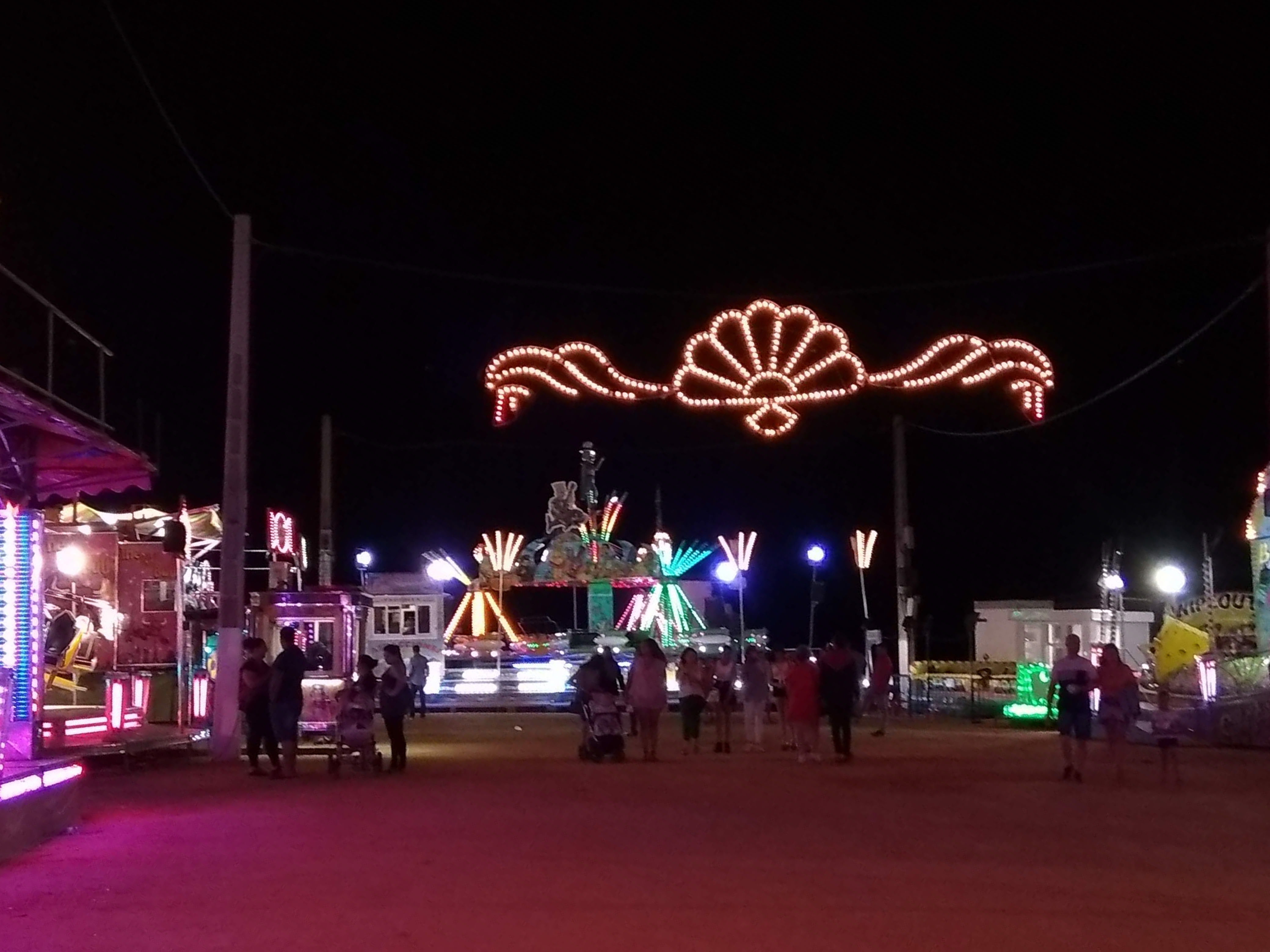 atraciones